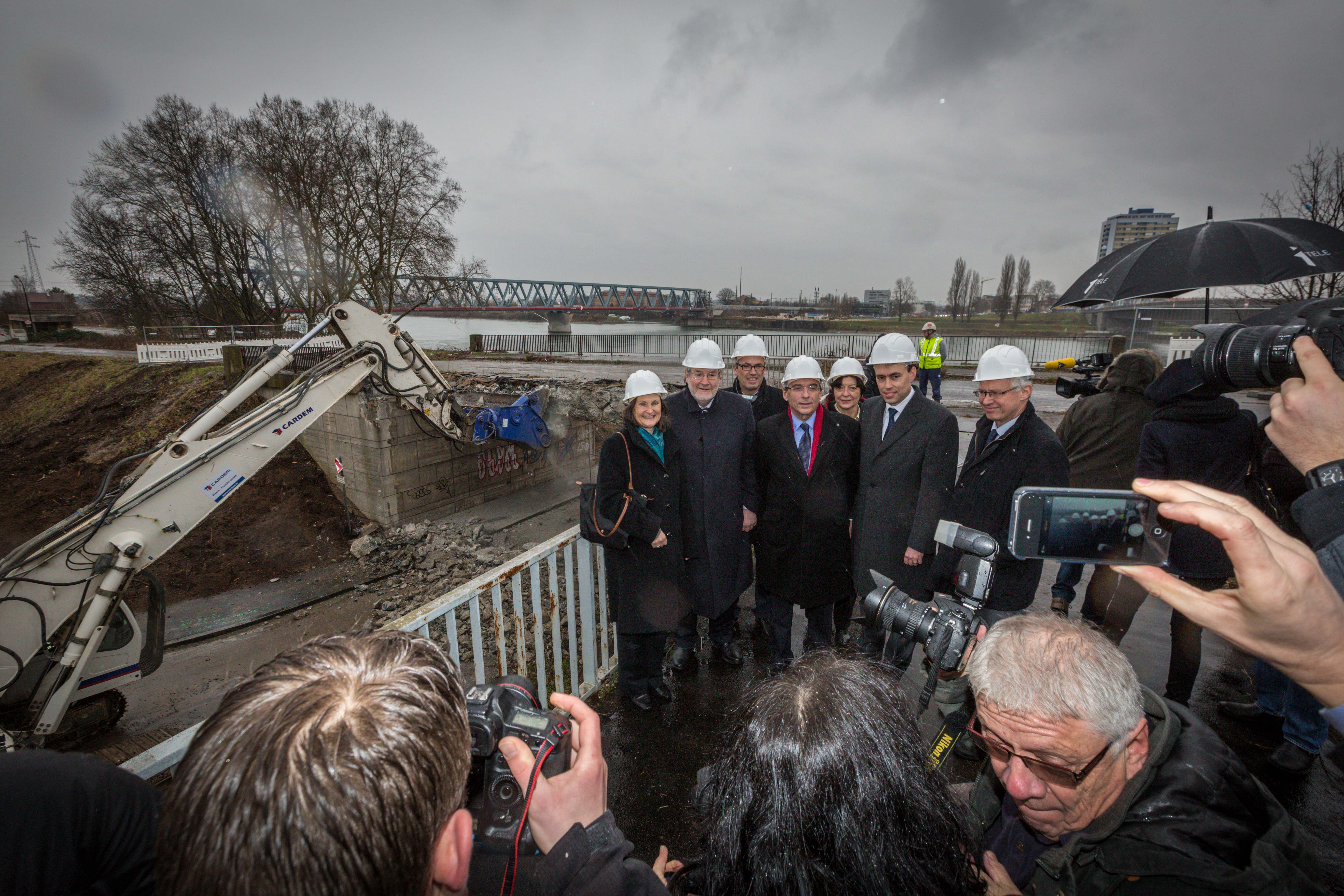 Lancement des travaux d'extension de la ligne D du tramway vers Kehl en présence du Dr. Günther Petry, Maire de Kehl, de Nils Schmid, Ministre de l’économie et des finances du Land de Bade-Wurtemberg, Vice Ministre-Président du Land de Bade-Wurtemberg, du Dr. Dieter Glück, Chef de division auprès du Ministère fédéral des transports et des infrastructures, de Gisela Splett, Secrétaire d’Etat du Ministère des transports et des infrastructures du Land de Bade-Wurtemberg, représentante du Ministre Winfrid Hermann, de Bärbel Schäfer, Regierungspräsidentin de Fribourg, de Michael Cramer, Député européen, de Frank Scherer, Landrat de l’Ortenaukreis et Président de l’Eurodistrict Strasbourg-Ortenau